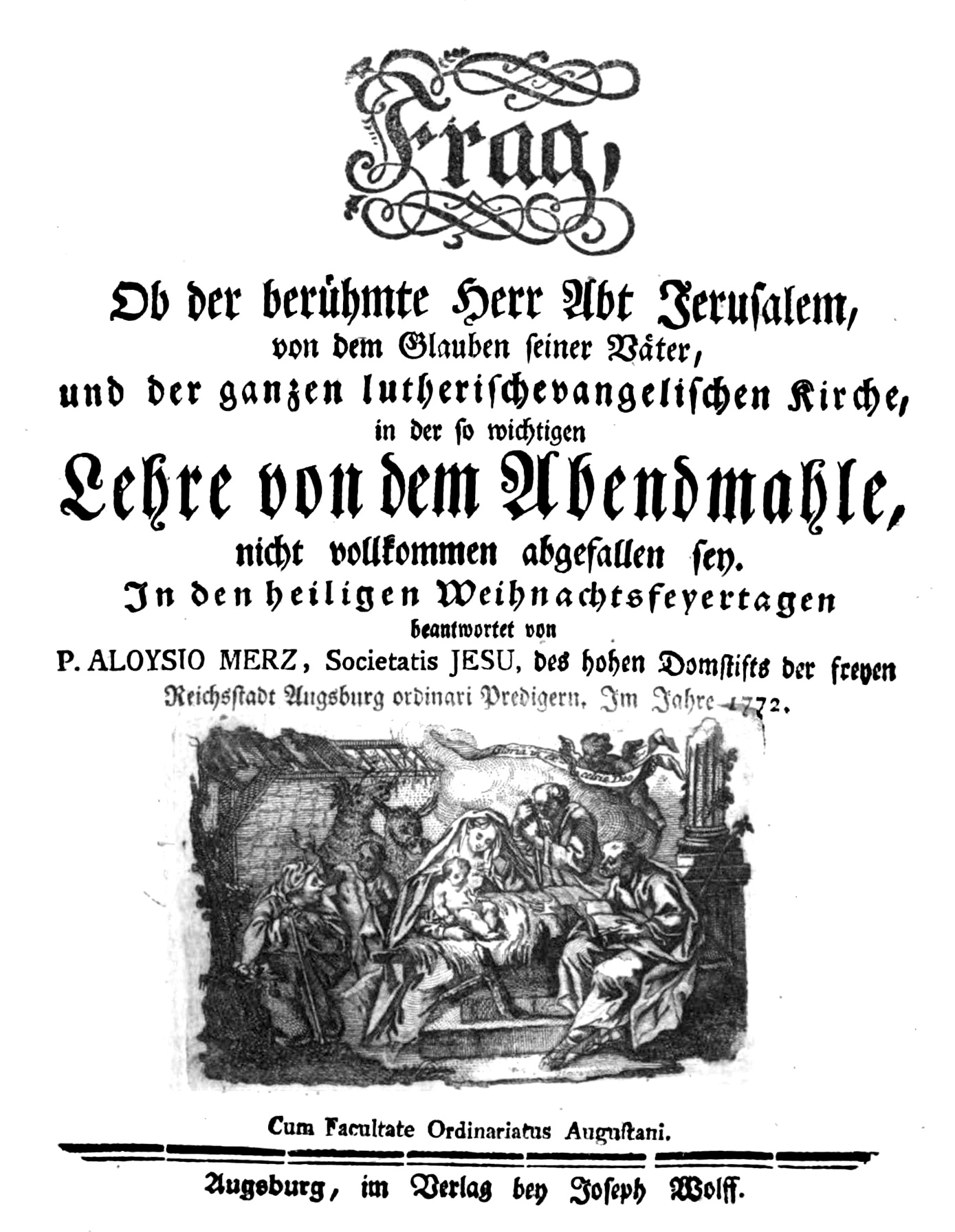 Alois Merz SJ (1727-1792), kontroverstheologische Schrift gegen Johann Friedrich Wilhelm Jerusalem zur Abendmahlslehre, Titelseite